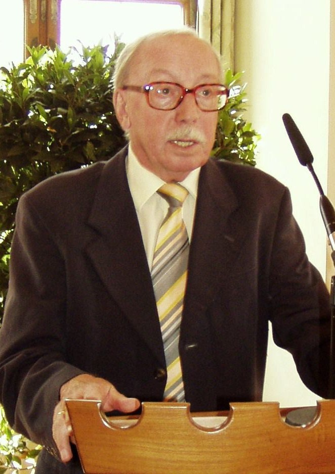 Prof. Dr. Klaus Louis Schmidt (* 1936), deutscher Mediziner